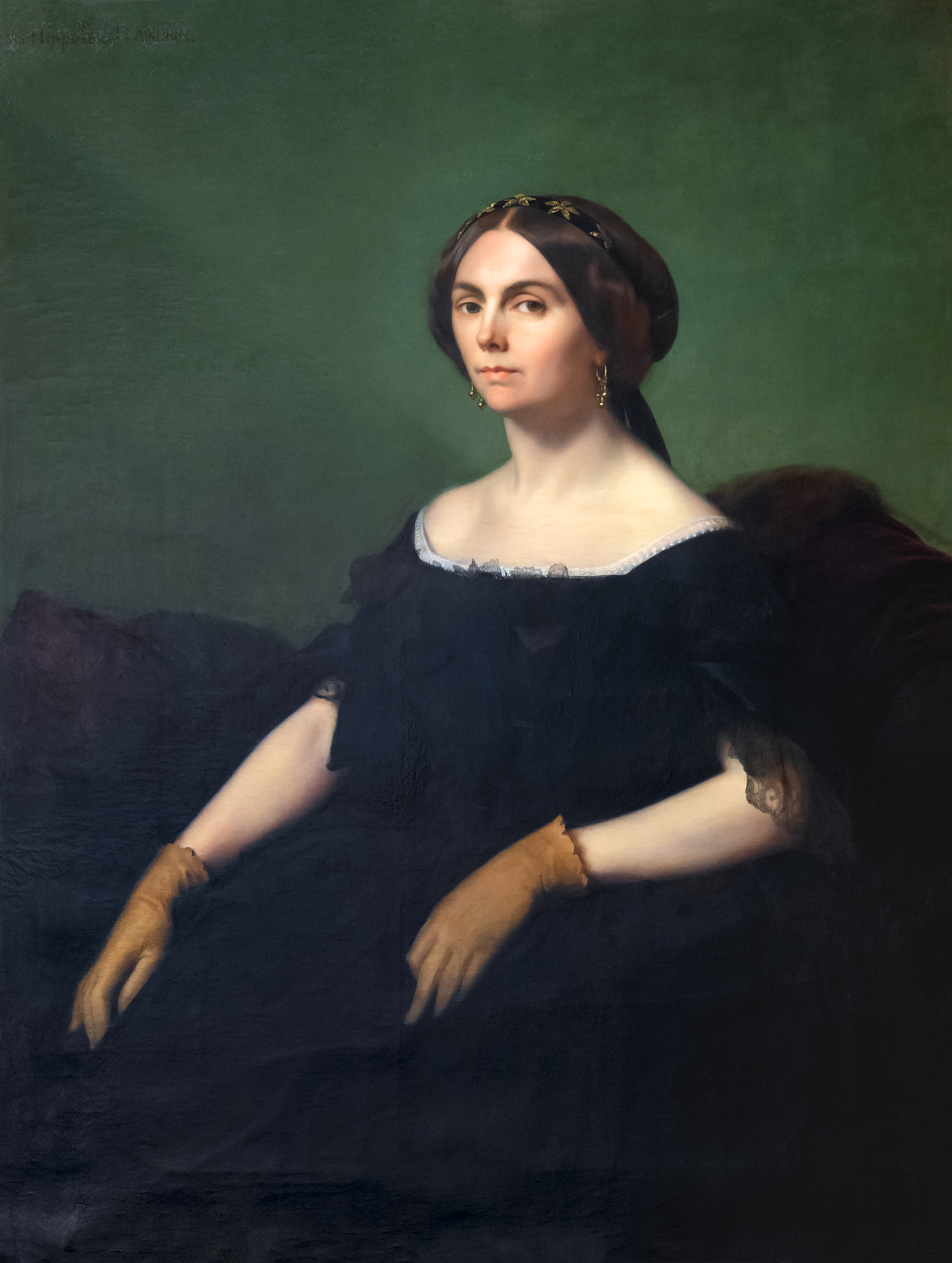 La comtesse de Goyon : Auriane de Montesquiou Fezensac (Henriette Auriane de Montesquiou Fezensac). Née le 16 novembre 1813 à Paris et décédée le 15 juillet 1887 au Château de Prunoy. Parents : Raymond de Montesquiou Fezensac, duc de Fezensac 1784-1867 et Henriette Clarke de Feltre 1790-1831. Mariée le 16 novembre 1836, Paris, avec Charles Marie Augustin, comte de Goyon 1803-1888.